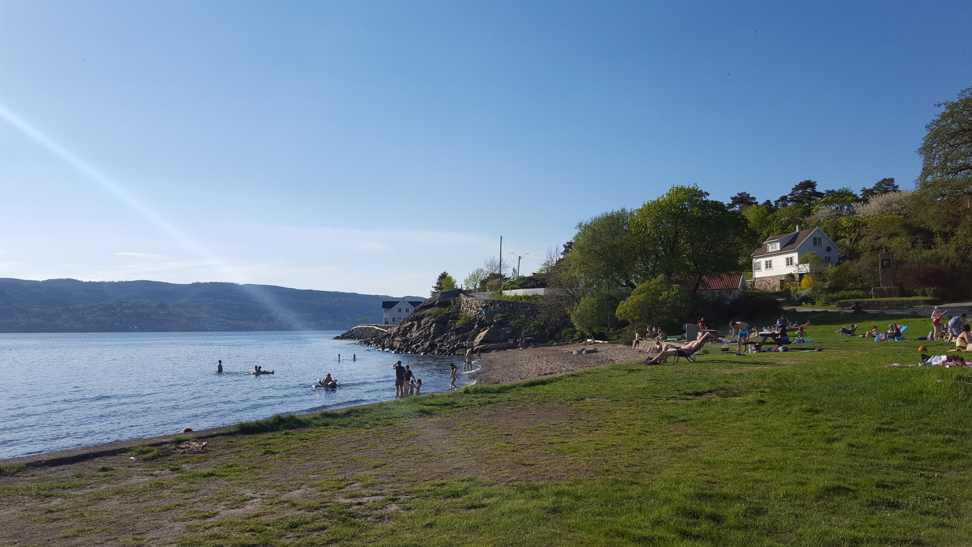 Hvitsten strand